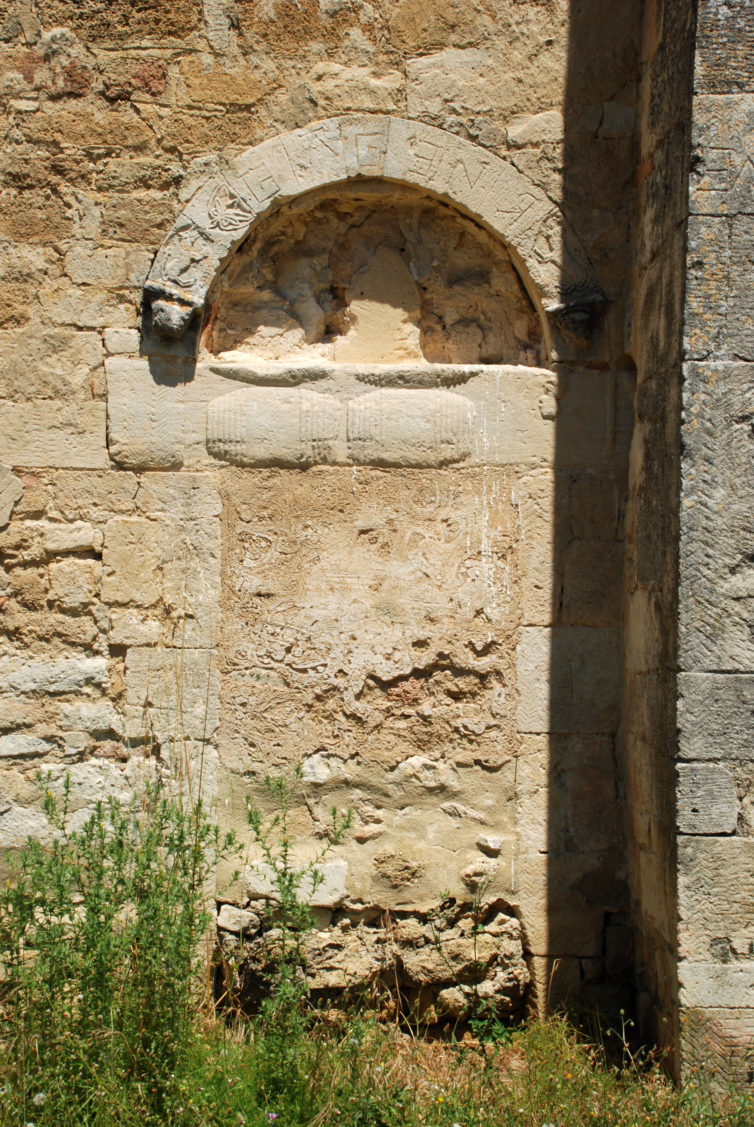 France - Drôme - Église Saint-Pierre-ès-Liens de Colonzelle